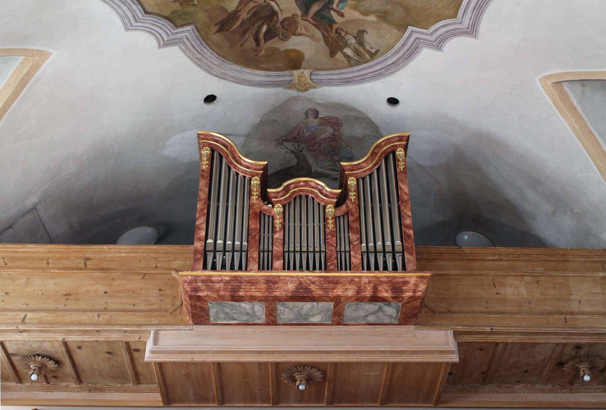 Orgel der Pfarrkirche Mariä Himmelfahrt in Brannenburg am Inn (1905, F. B. Maerz, I/8; 1999 renoviert und erweitert von Alois Linder)